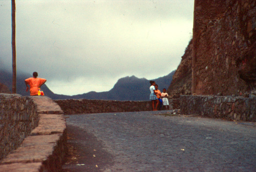 Paúl S.Antão. Julho de 1997. OTIMarte